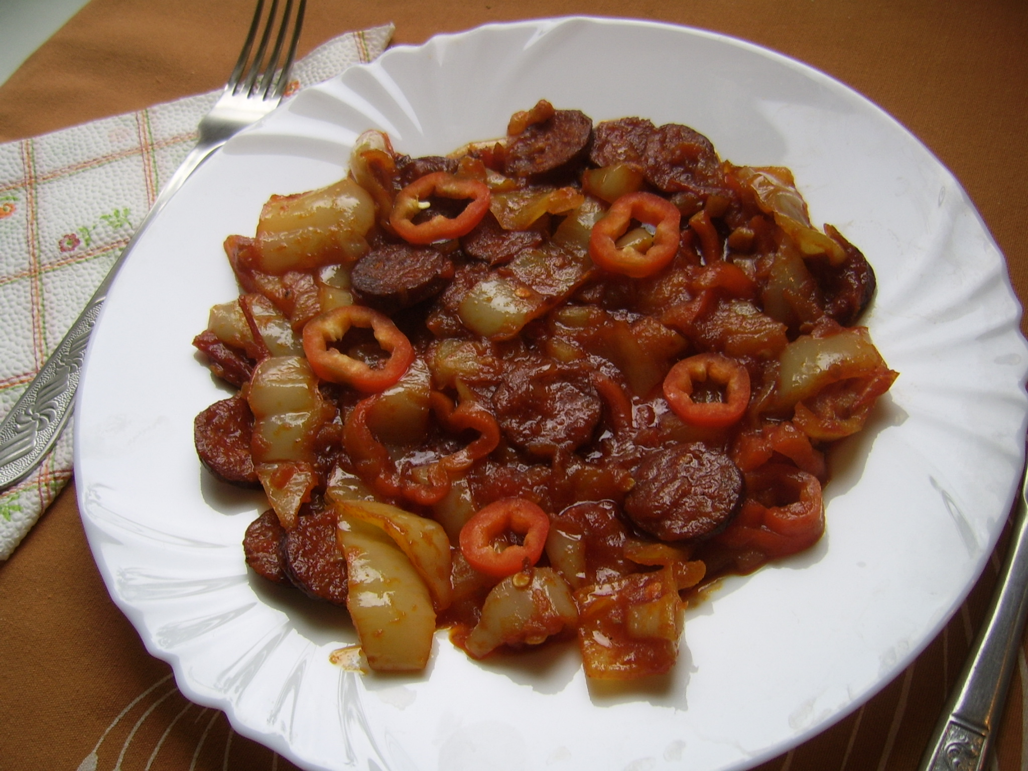 Lecsó kolbásszal sajátkezűleg főztem és fényképeztem